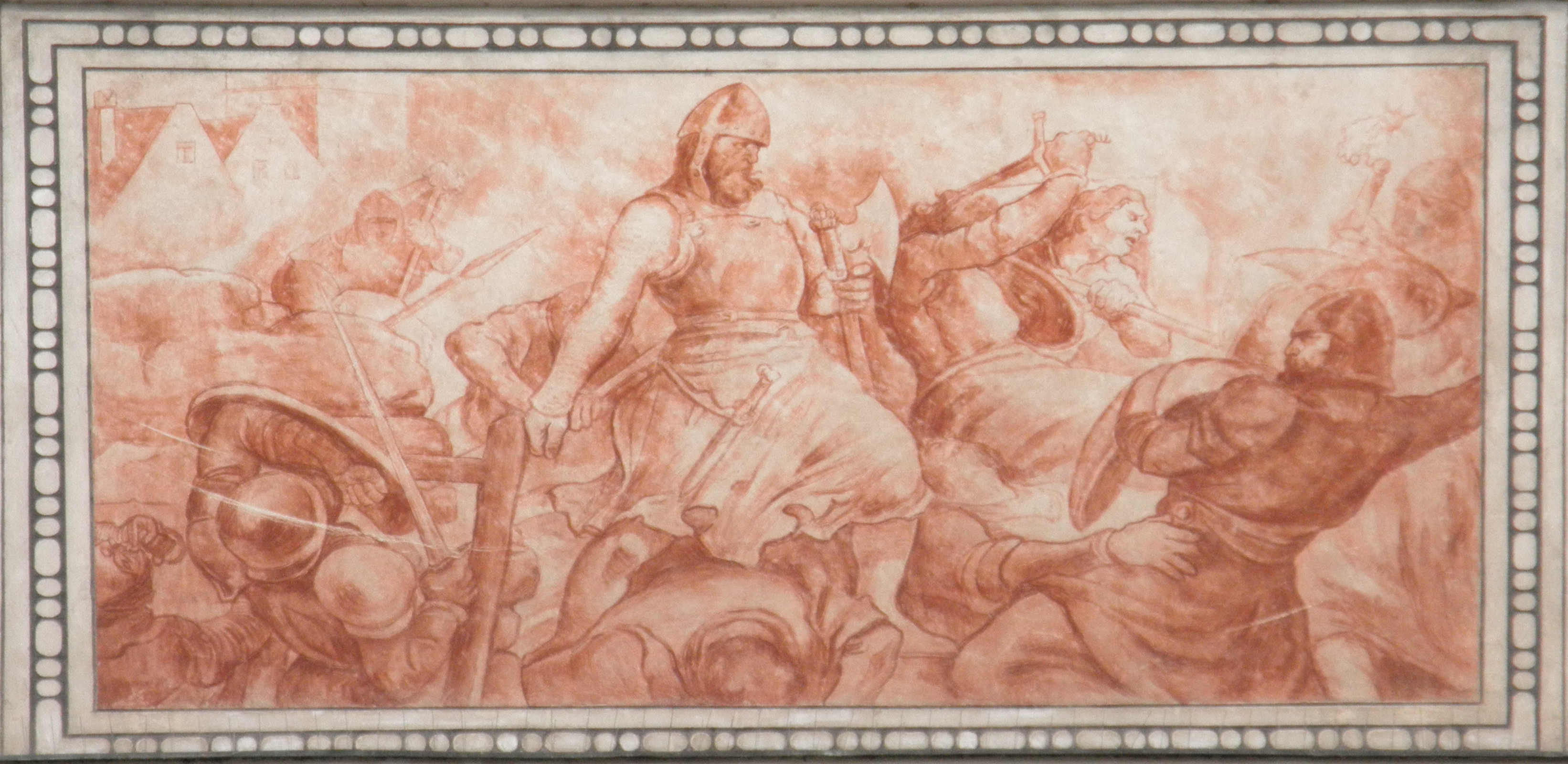 Radnice (Kolín), Karlovo nám. 77, Kolín. Freska: "Husitská vojska pod vedením Prokopa Holého dobývají Kolín" v roce 1427. Autor: Adolf Liebscher.